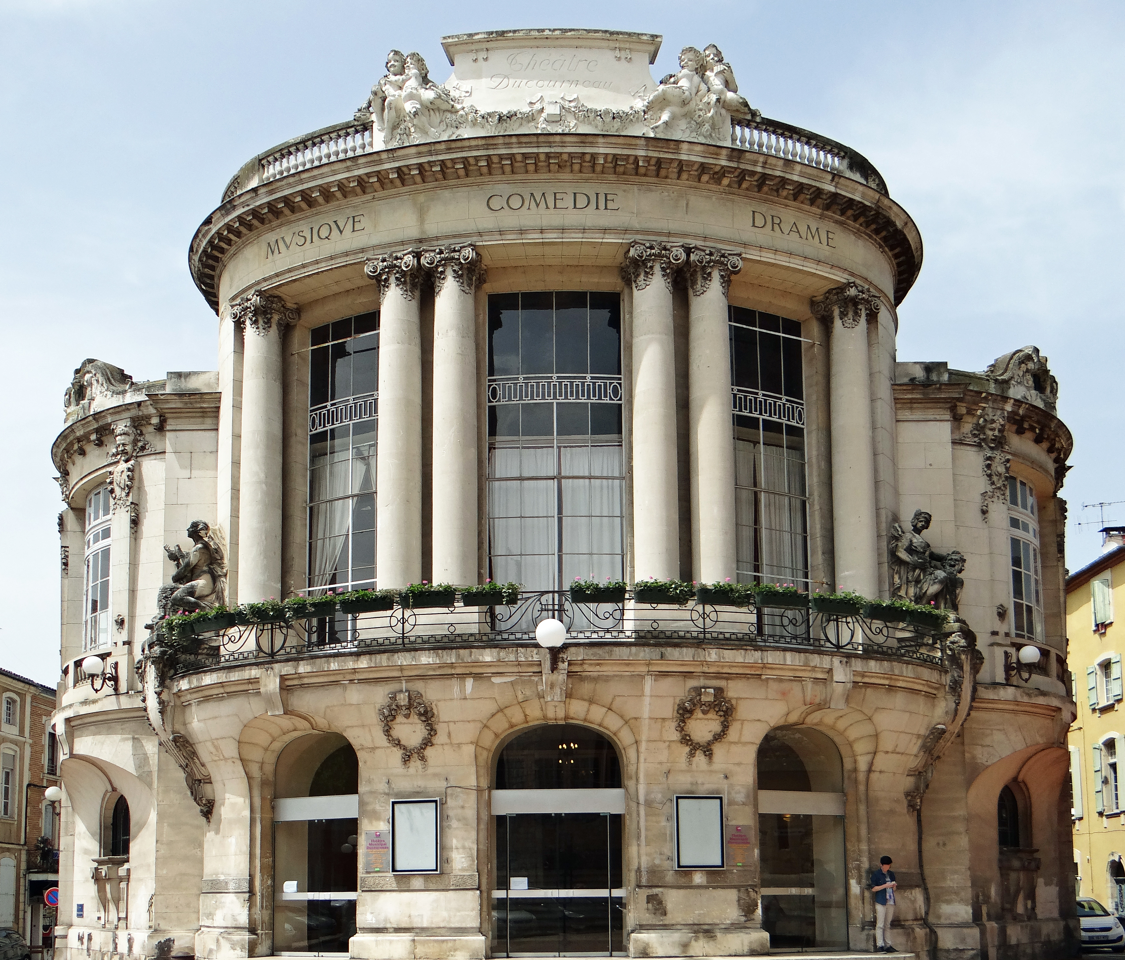 Agen - Théâtre Ducourneau - Façade sur la place du Docteur-Esquirol